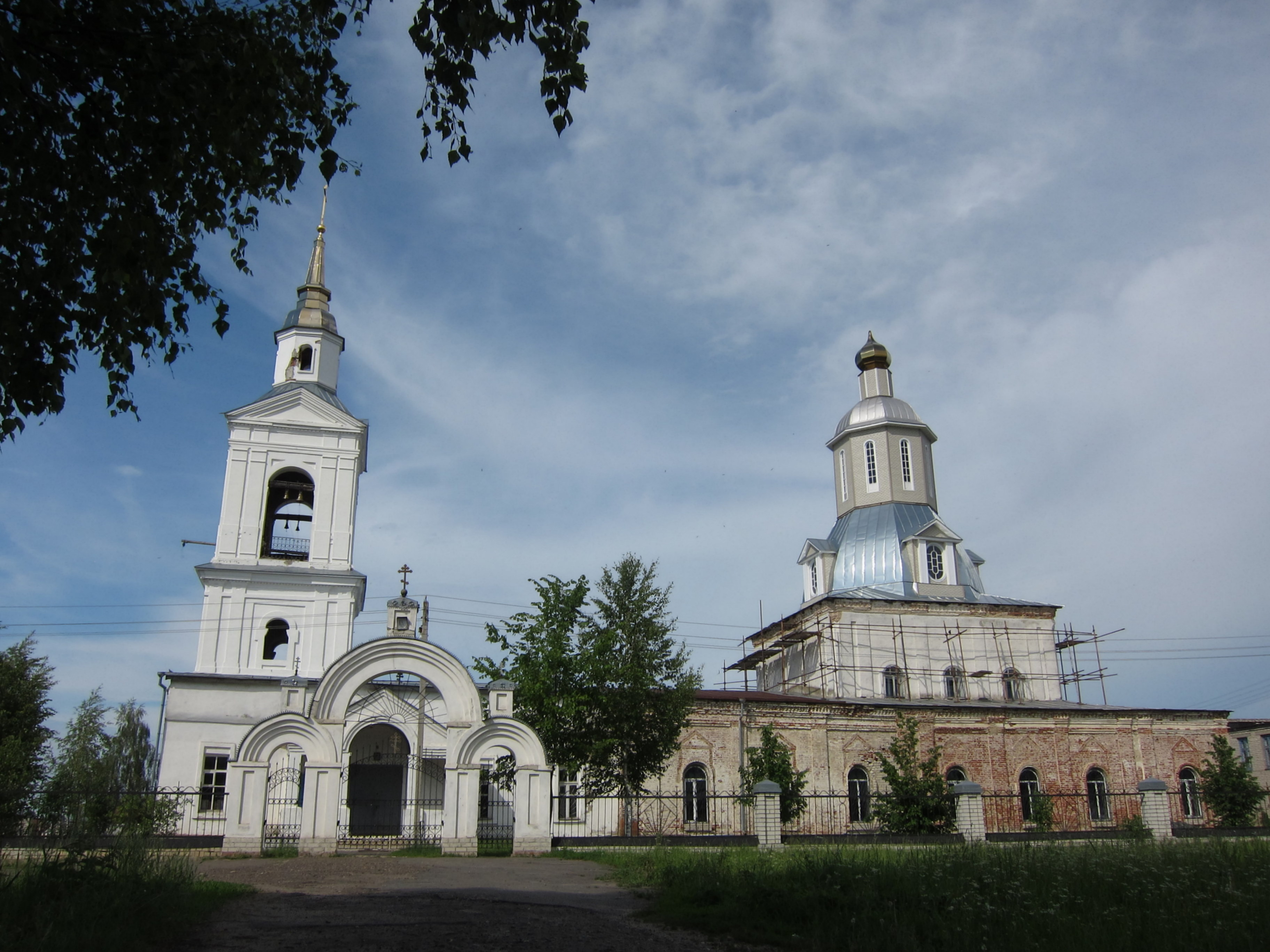 Церковь Рождества Христова - в с. Красное, Арзамасский район Нижегородской области.